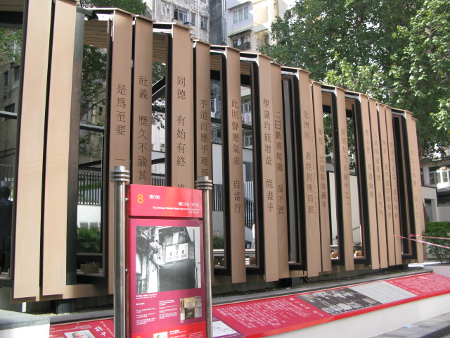 中文（香港）: 香港中環百子里公園輔仁文社序亭架